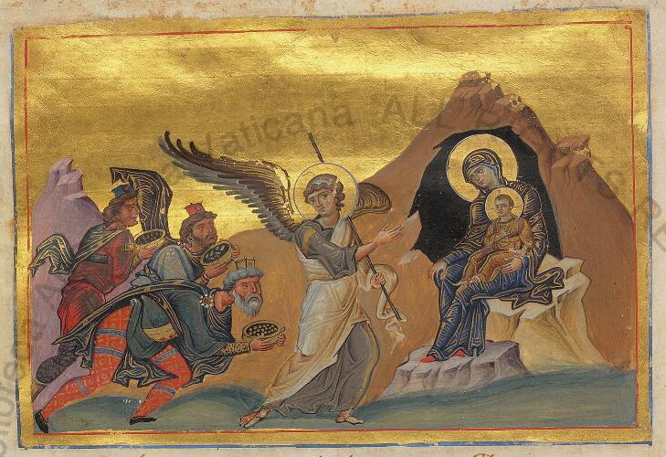 The Adoration of the Magi Константинополь. 985 г. Миниатюра Минология Василия II. Ватиканская библиотека. Рим.